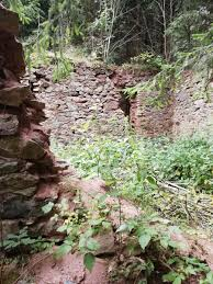 Photo of the only visibile ruin in Pribyslavitz